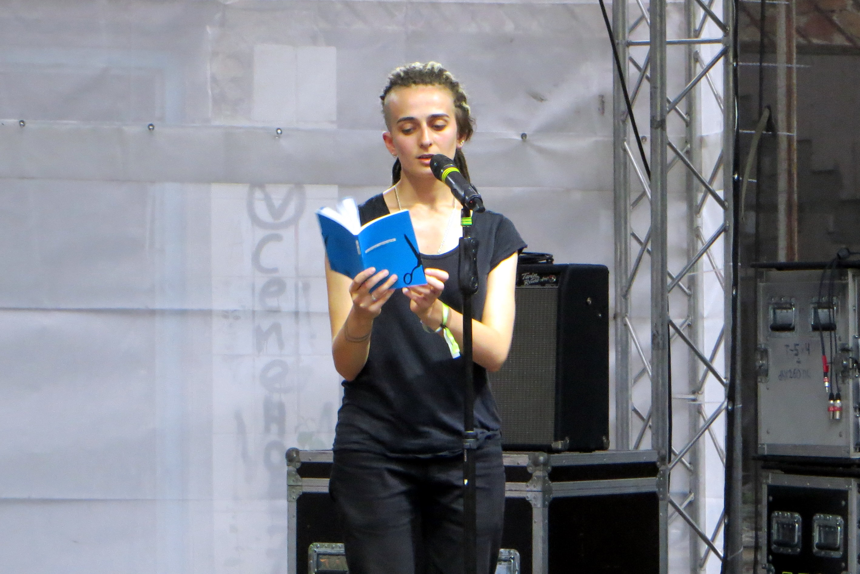 Четвертий фестиваль Atlas Weekend. Вікторія Дикобраз на Art Stage